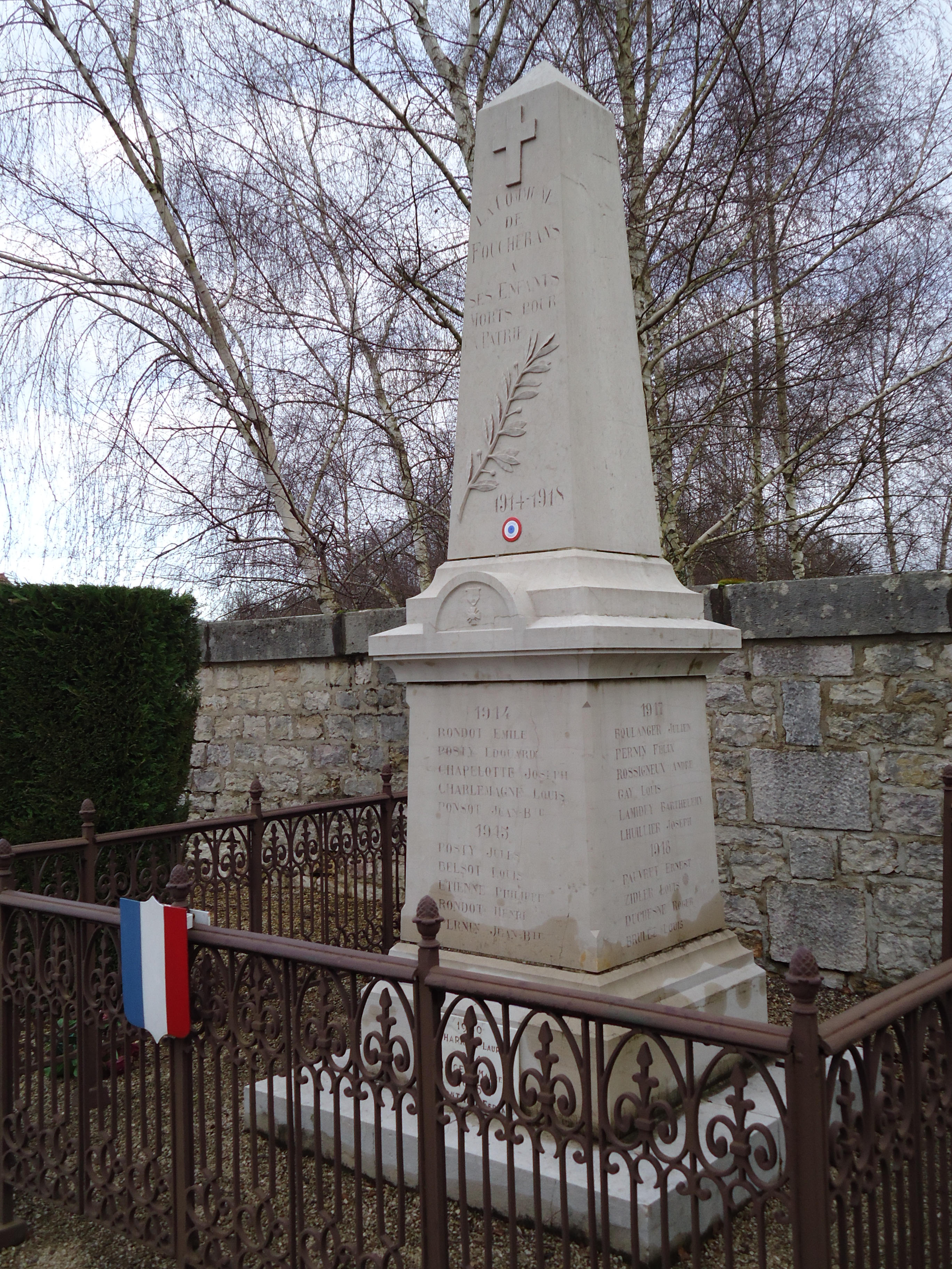 Monuments aux morts de Foucherans